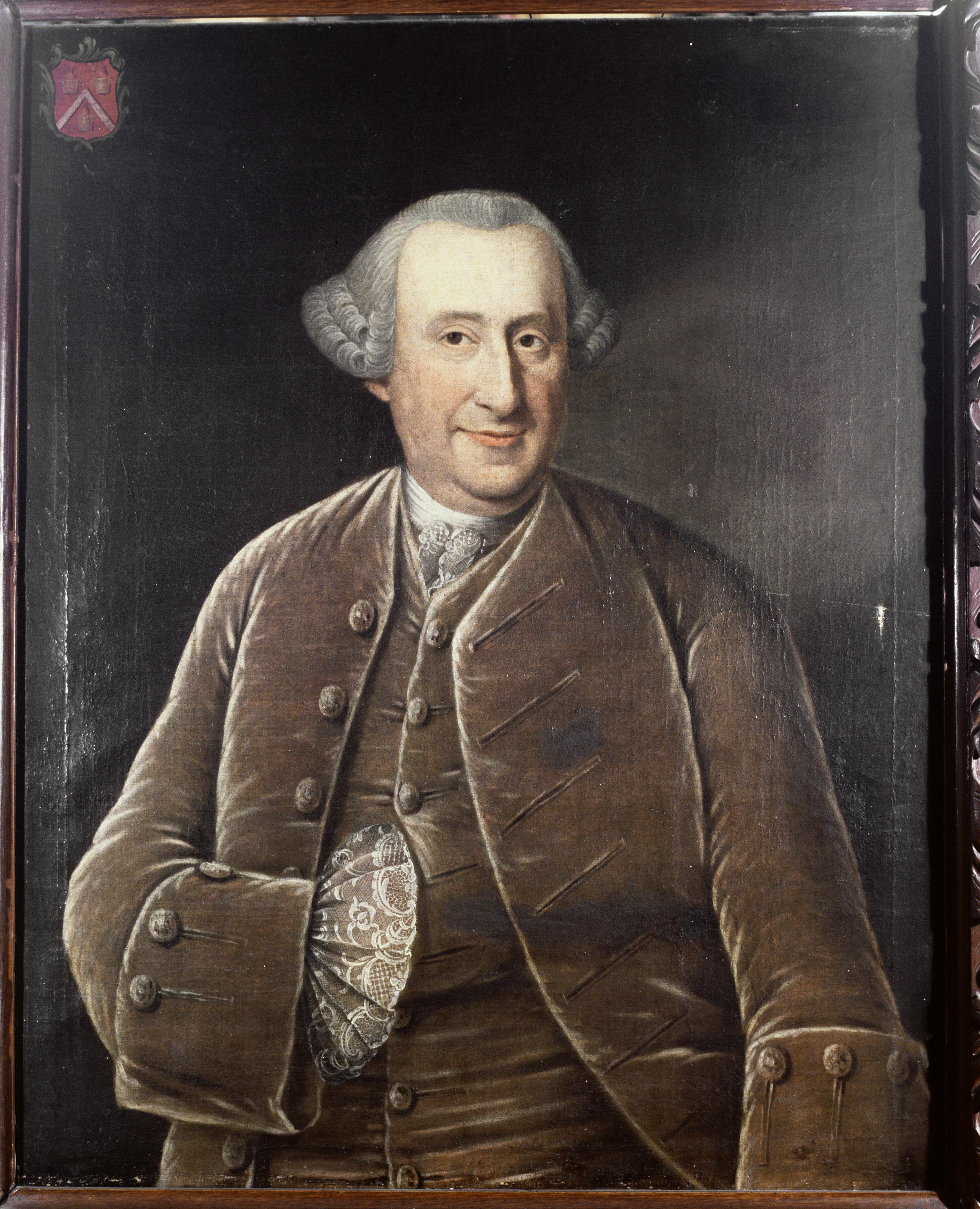 Portrait of Carel Lodewijk de Pagniet